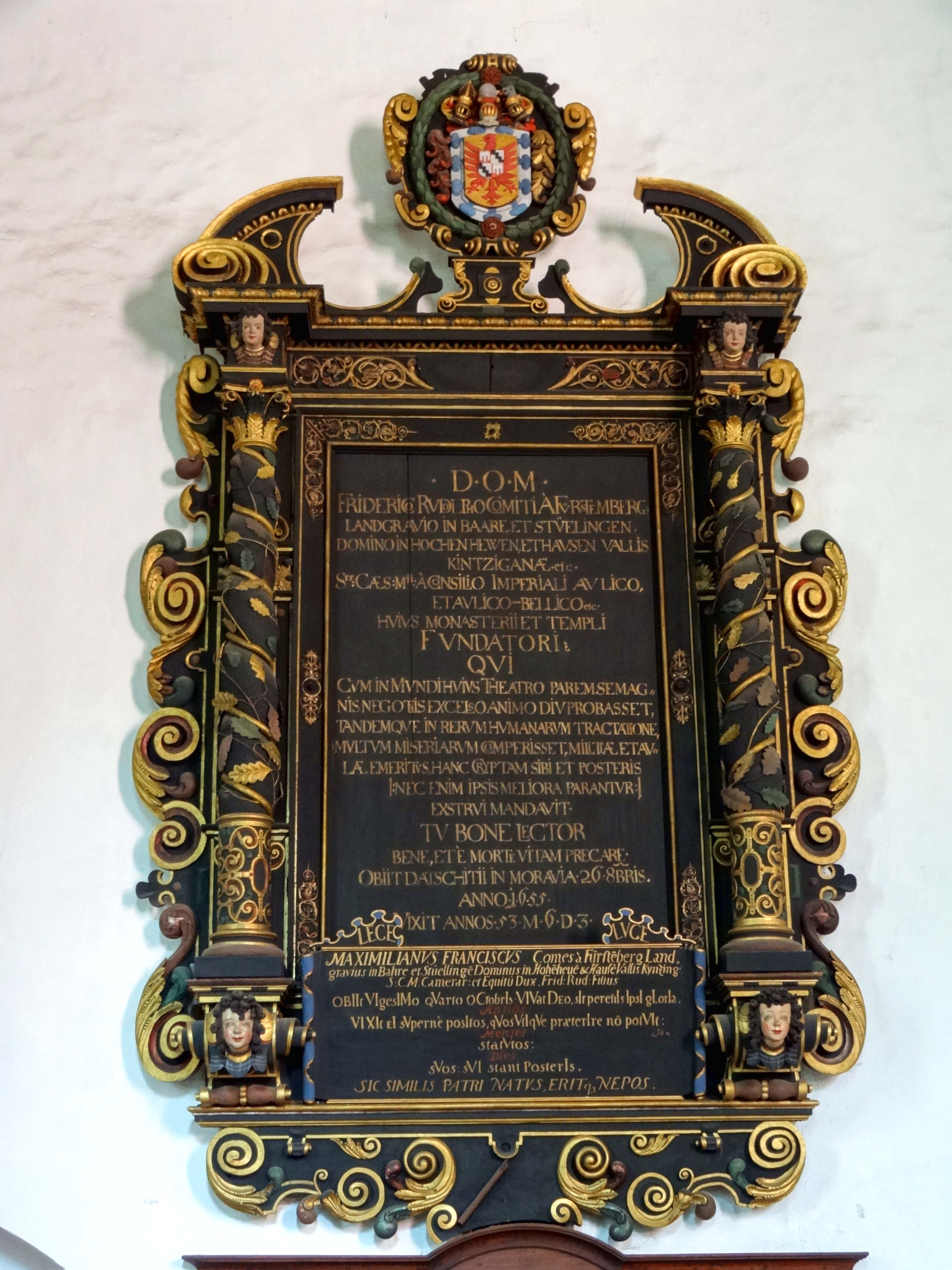 Kirche des ehem. Kapuzinerklosters, Innenansicht - siehe Bildtitel.